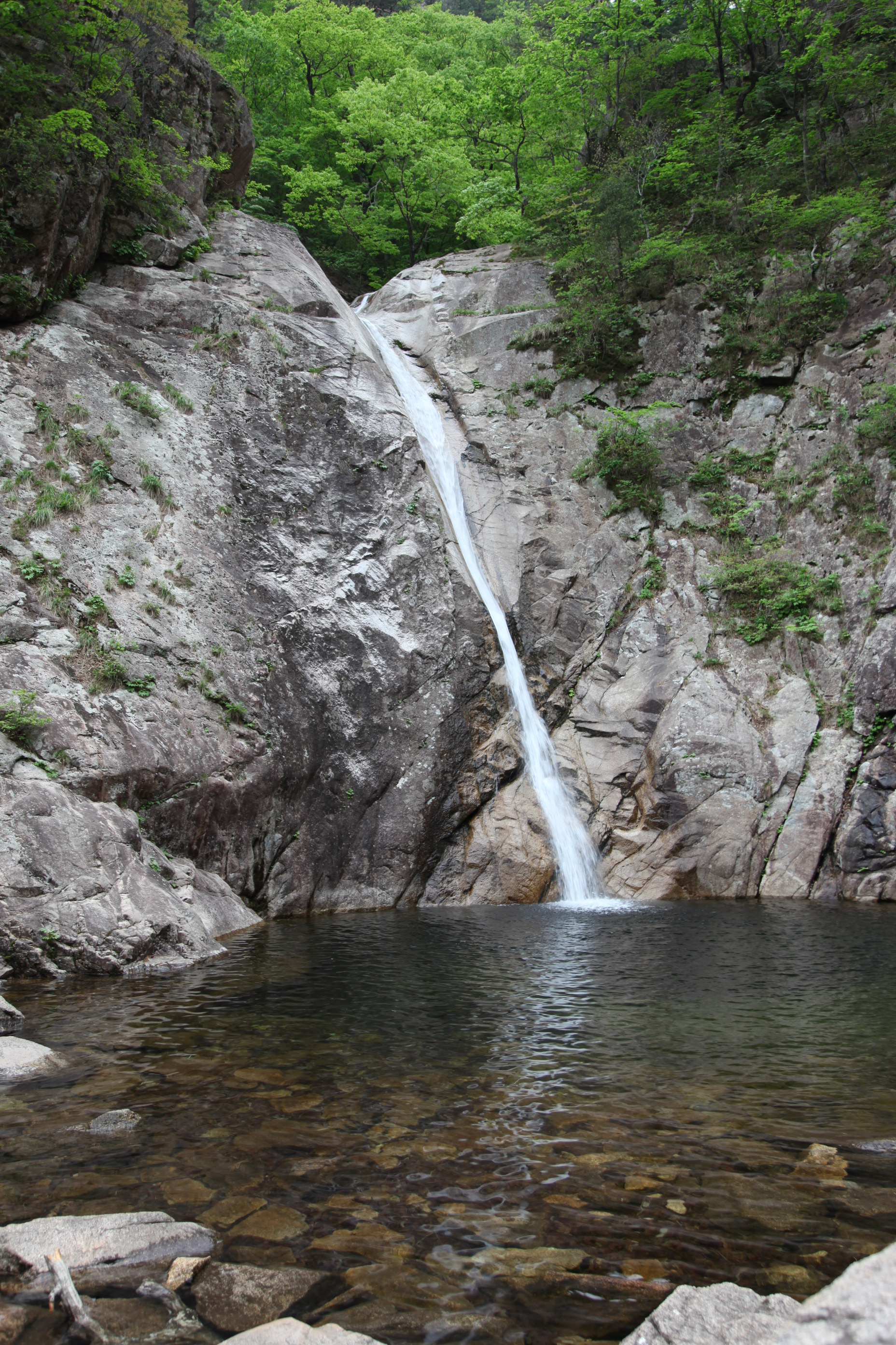 Сораксан, водопад Бирёнг, Biryong Falls